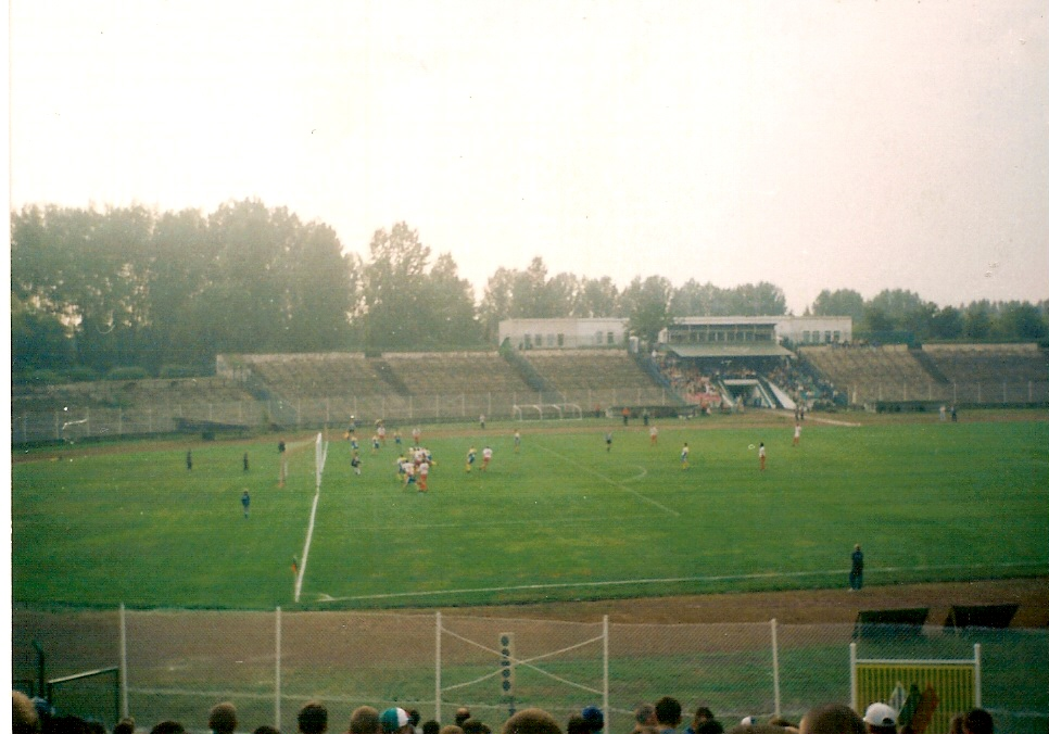 Stadion Ludowy - Mecz Zagłębia Sosnowiec z Aluminium Konin (21-08-1999)